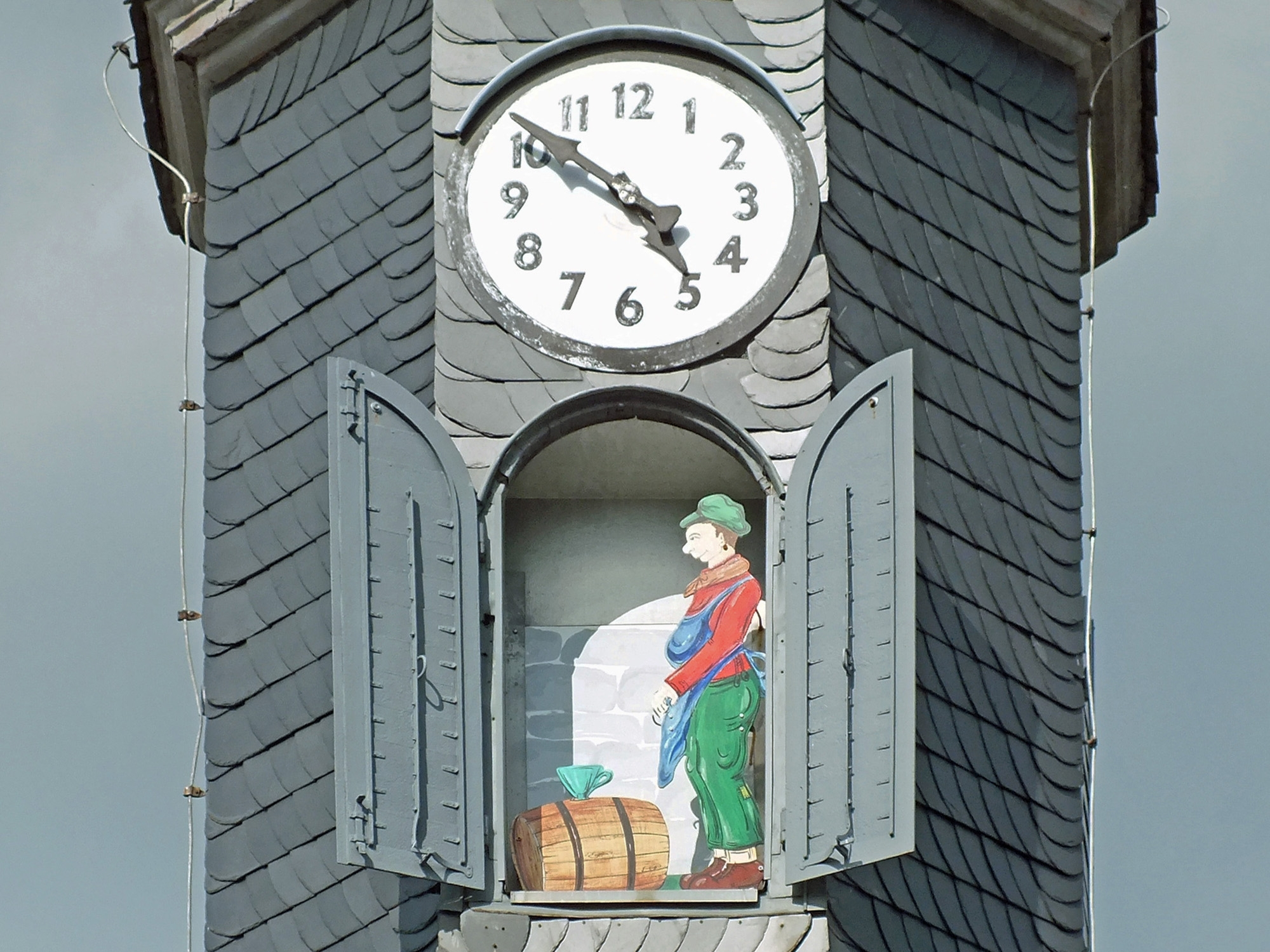 Fässleseecher: Figur im Bad Lobensteiner Rathausturm mit Bezug auf den Spitznamen der Lobensteiner